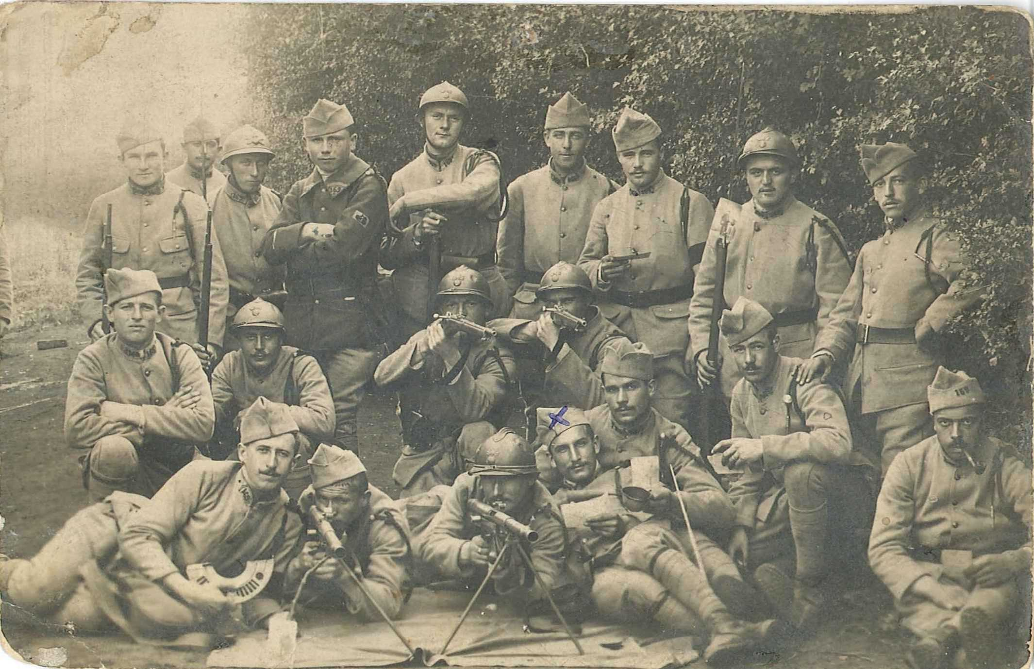 C'est une photographie qui présente des soldats du 169e régiment d'infanterie . Certains posent avec des armes.